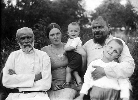 Коля Дроздов на руках у матери Надежды Павловны, слева — дед Сергей Иванович, справа — отец Николай Сергеевич с братом Сергеем. 1940 год